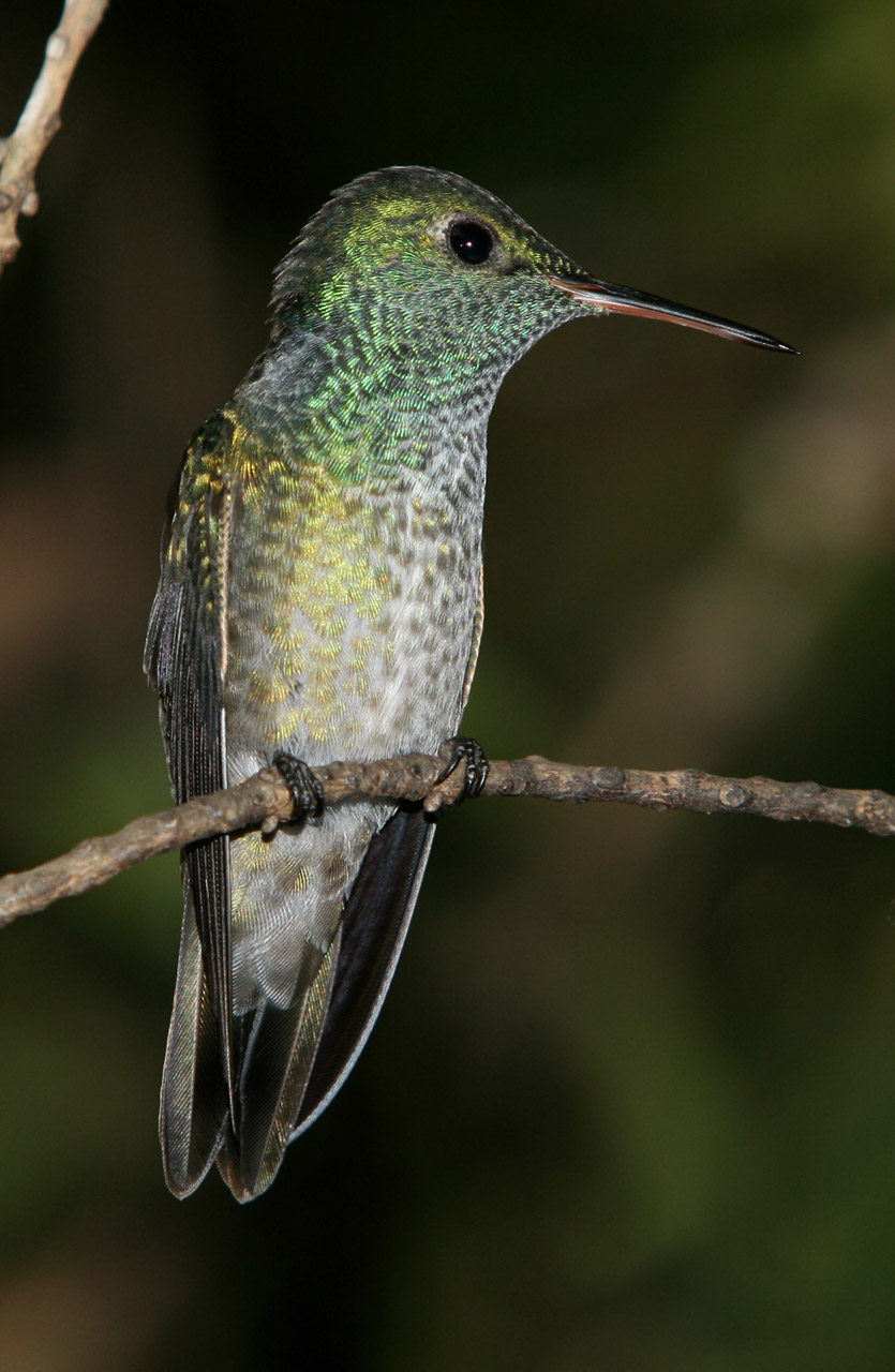 Versicolored Emerald (Amazilia_versicolor) Jardín de los Picaflores, Puerto Iguazú, Misiones, Argentinia